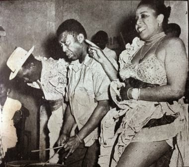 Silvano "Chori" Shueg playing timbales, 1950.